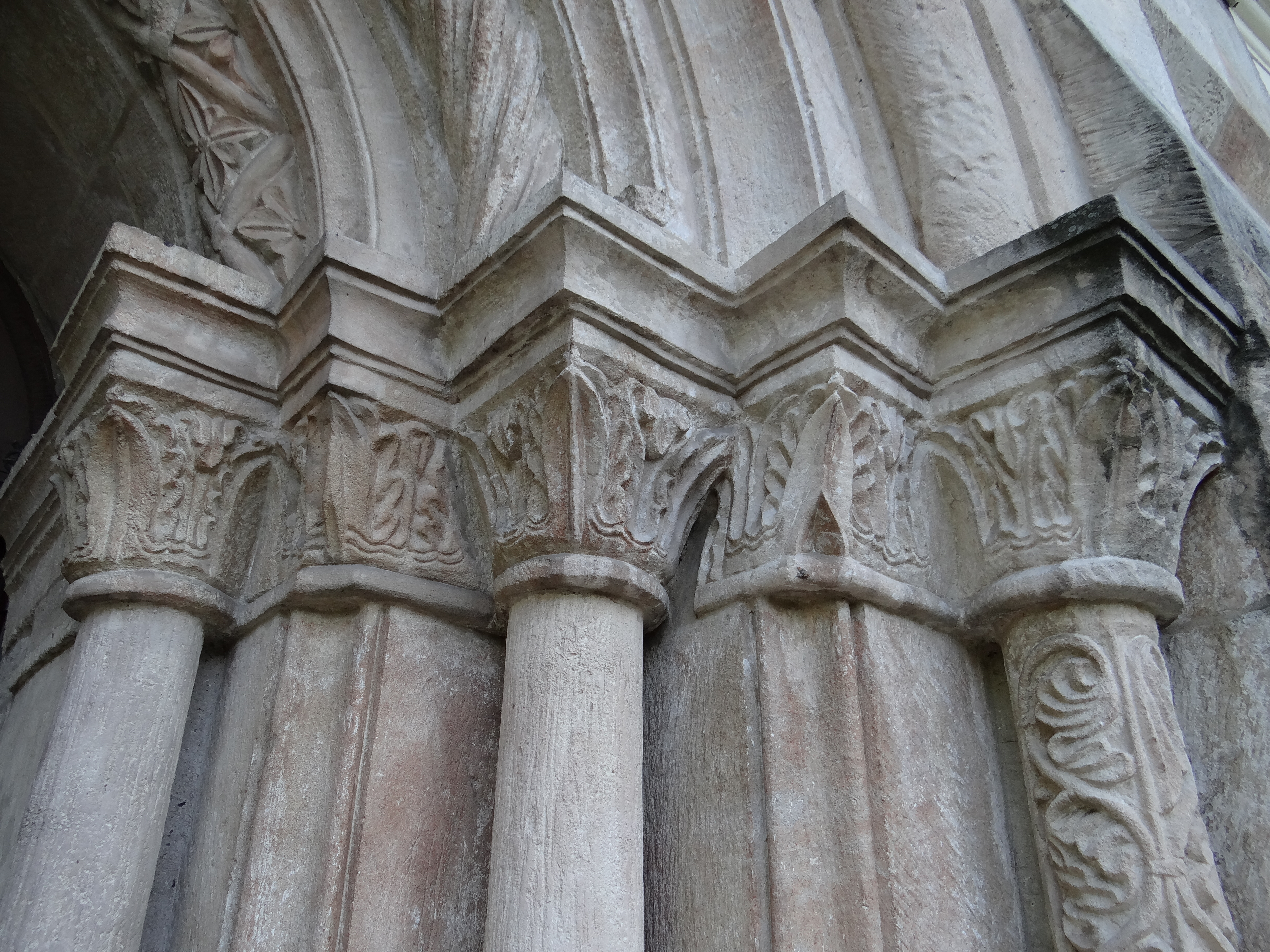 Kościelec - rzymskokatolicki kościół parafialny p.w. św. Wojciecha, 1230, 1628-1634, 1865, XX